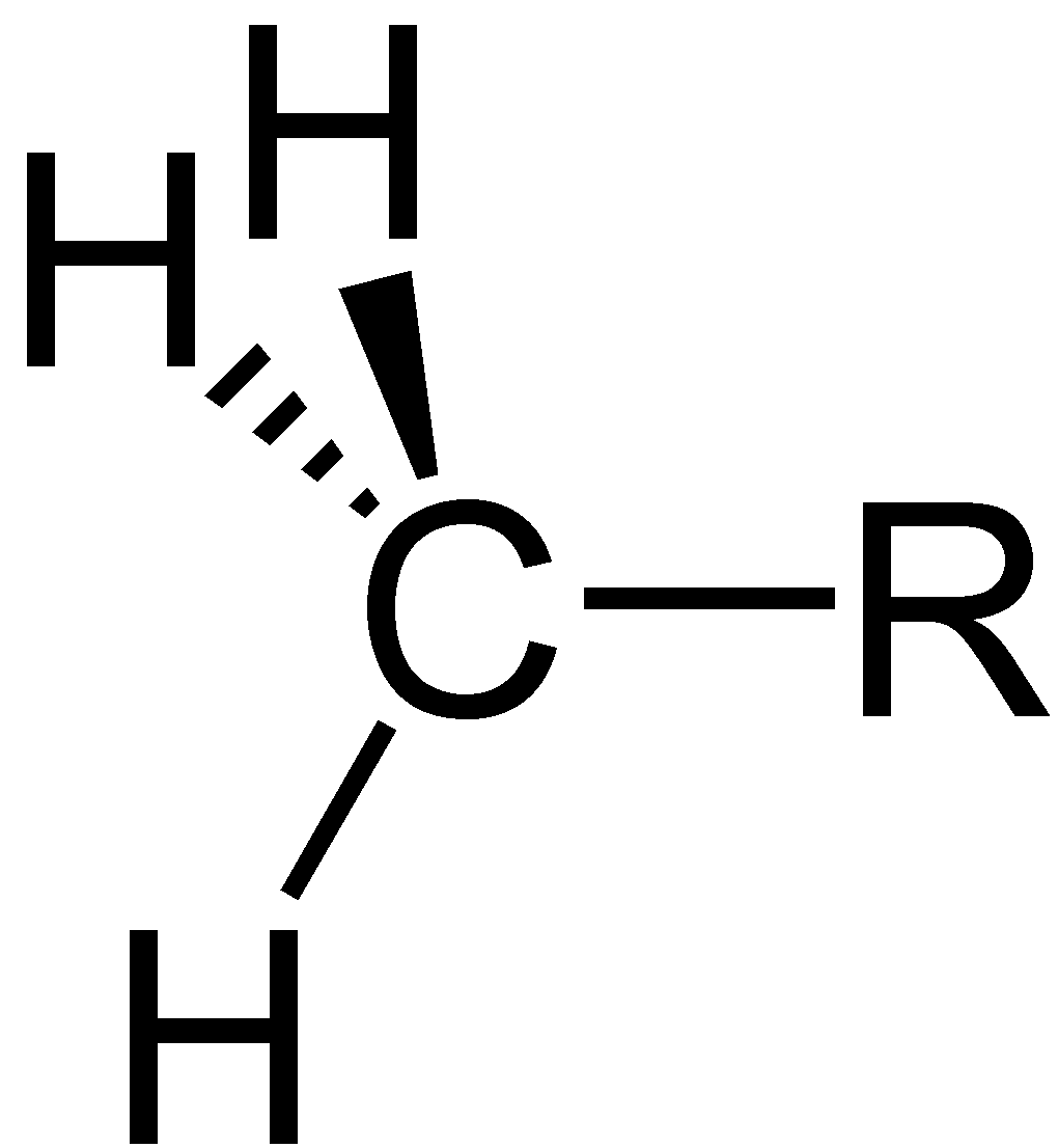 Methylrest